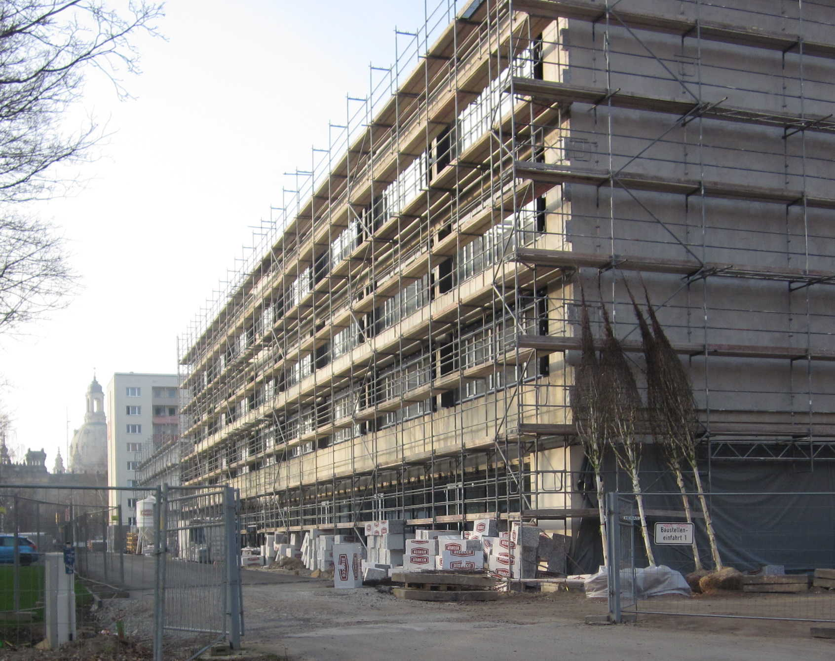 Dresden Marie-Curie-Gymnasium Bauvorhaben 2014